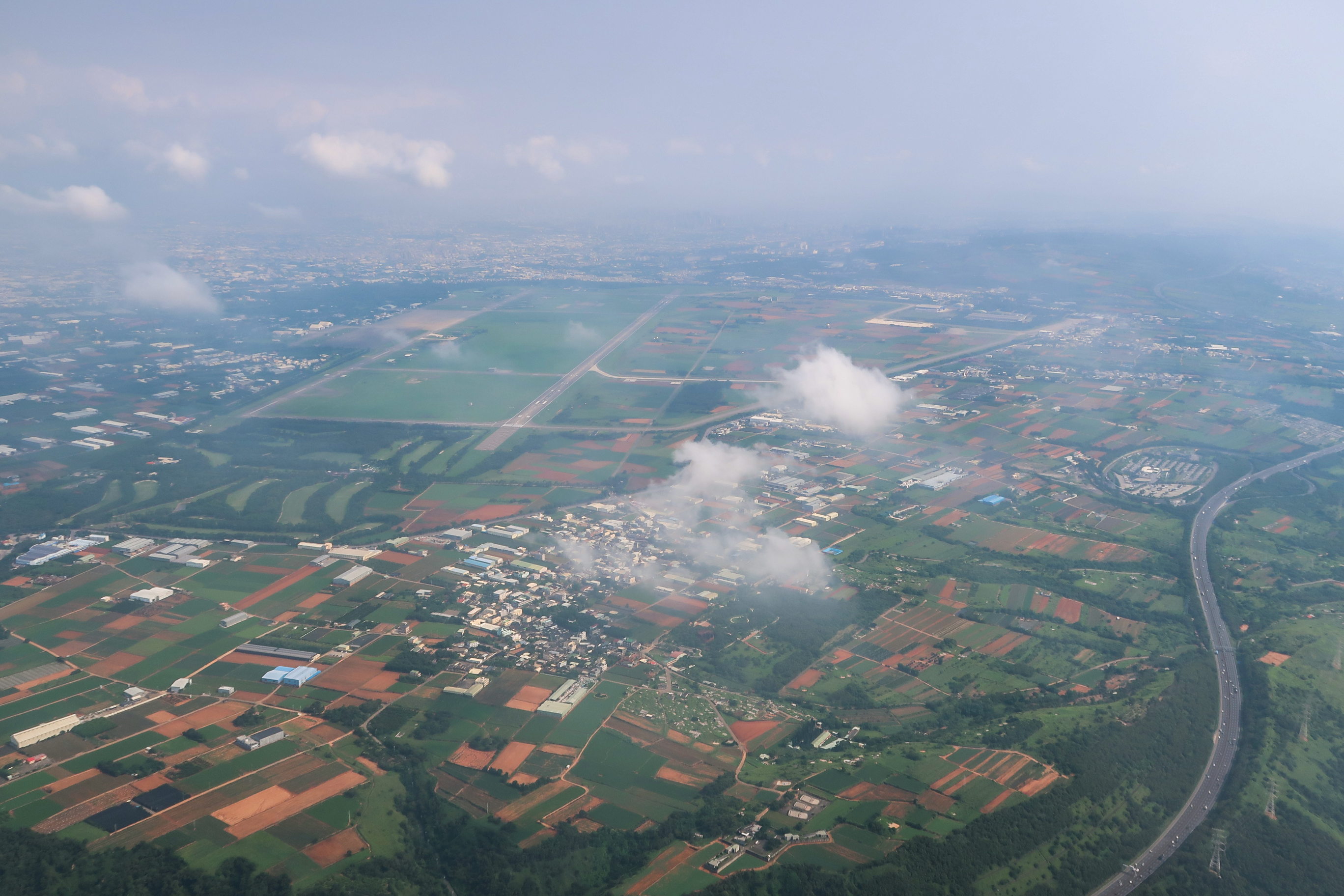 Qingshui District, Taichung